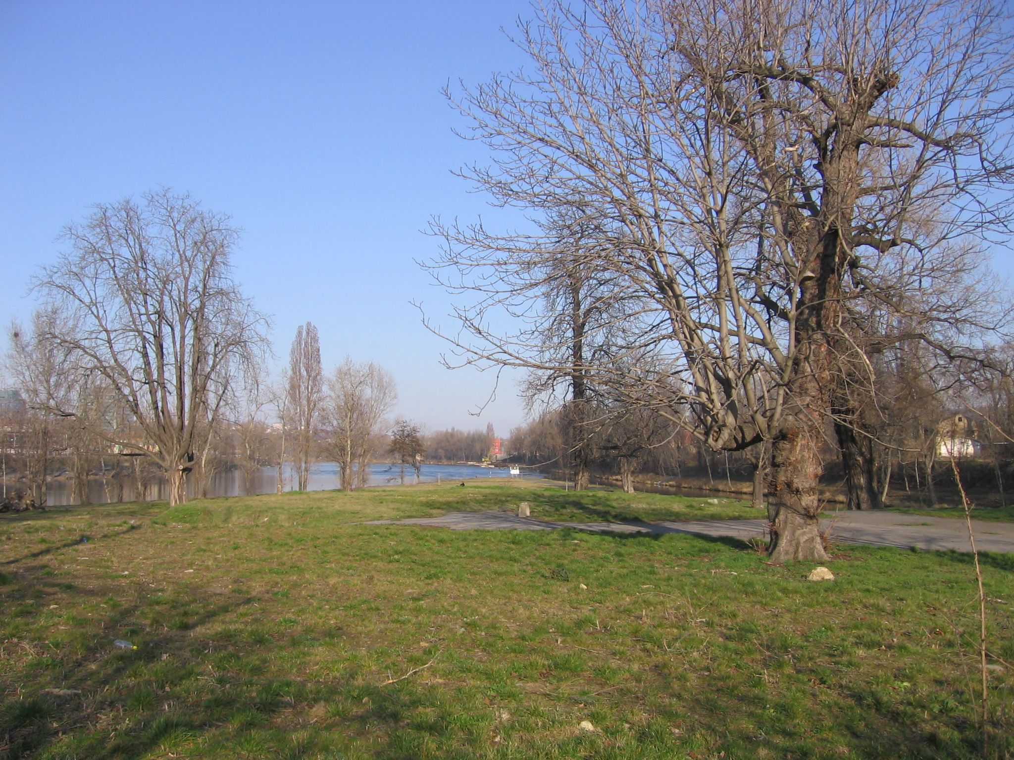 Ostrov Štvanice v Praze, východní cíp